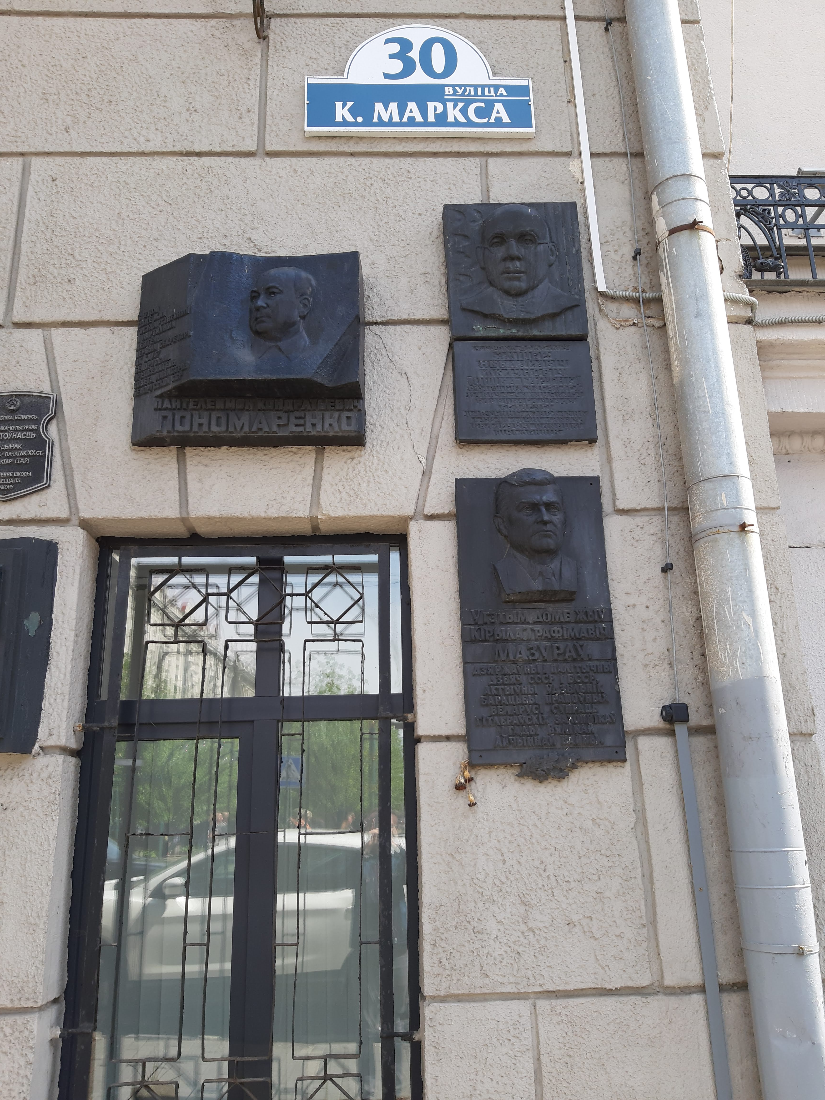 Мінск. Ад пл. Незалежнасці да Залатой Горкі